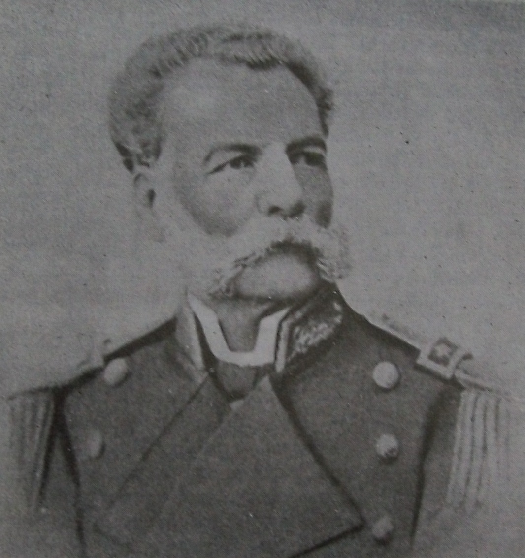 Augusto Lasserre